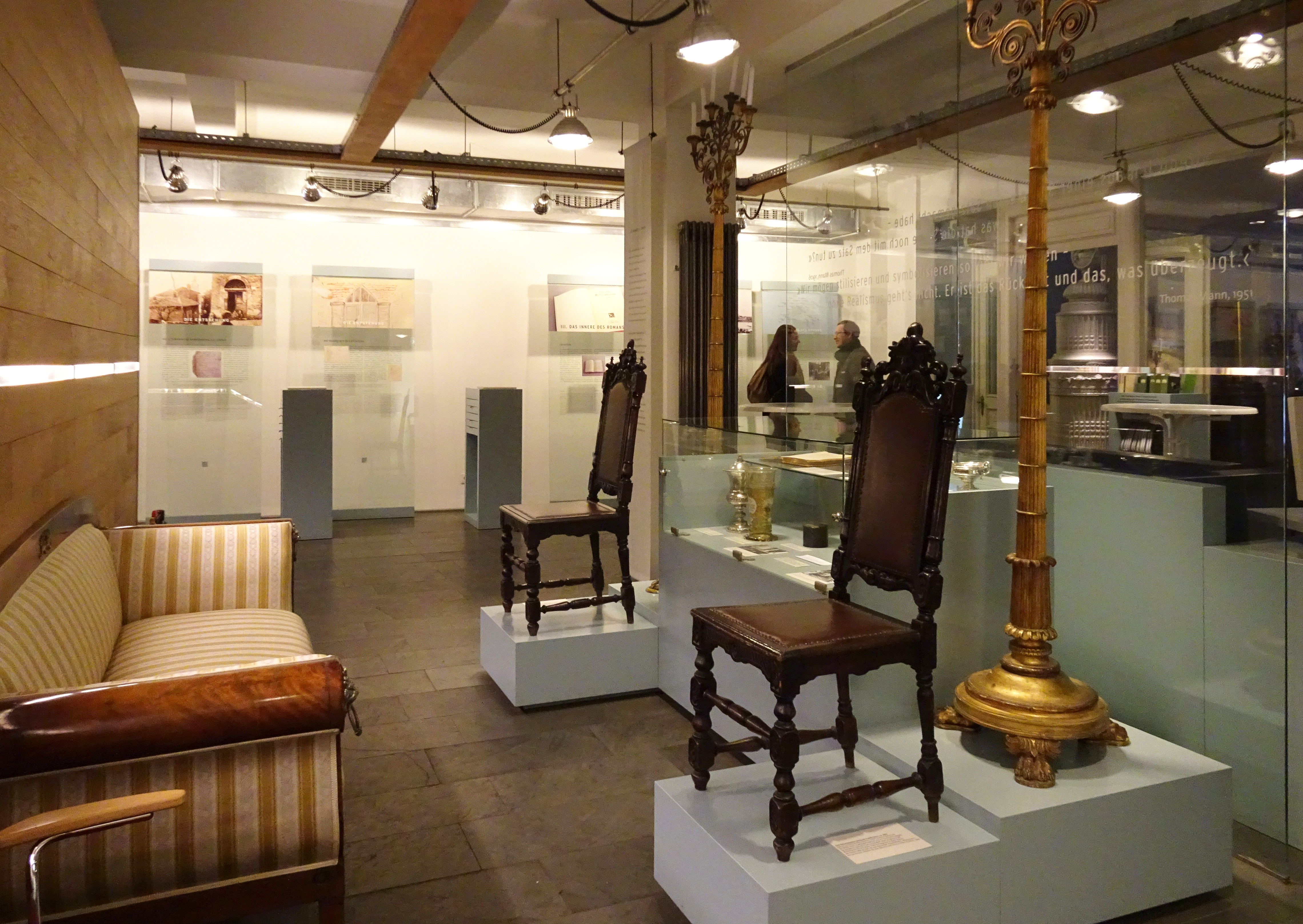 Buddenbrookhaus Ausstellung im Obergeschoss